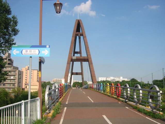 撮影場所:w:ja:北海道道1148号札幌恵庭自転車道線（白石サイクリングロード） 撮影日:2007年8月12日 撮影者:w:ja:利用者:もんもん